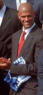 Basketball player Shane Battier.